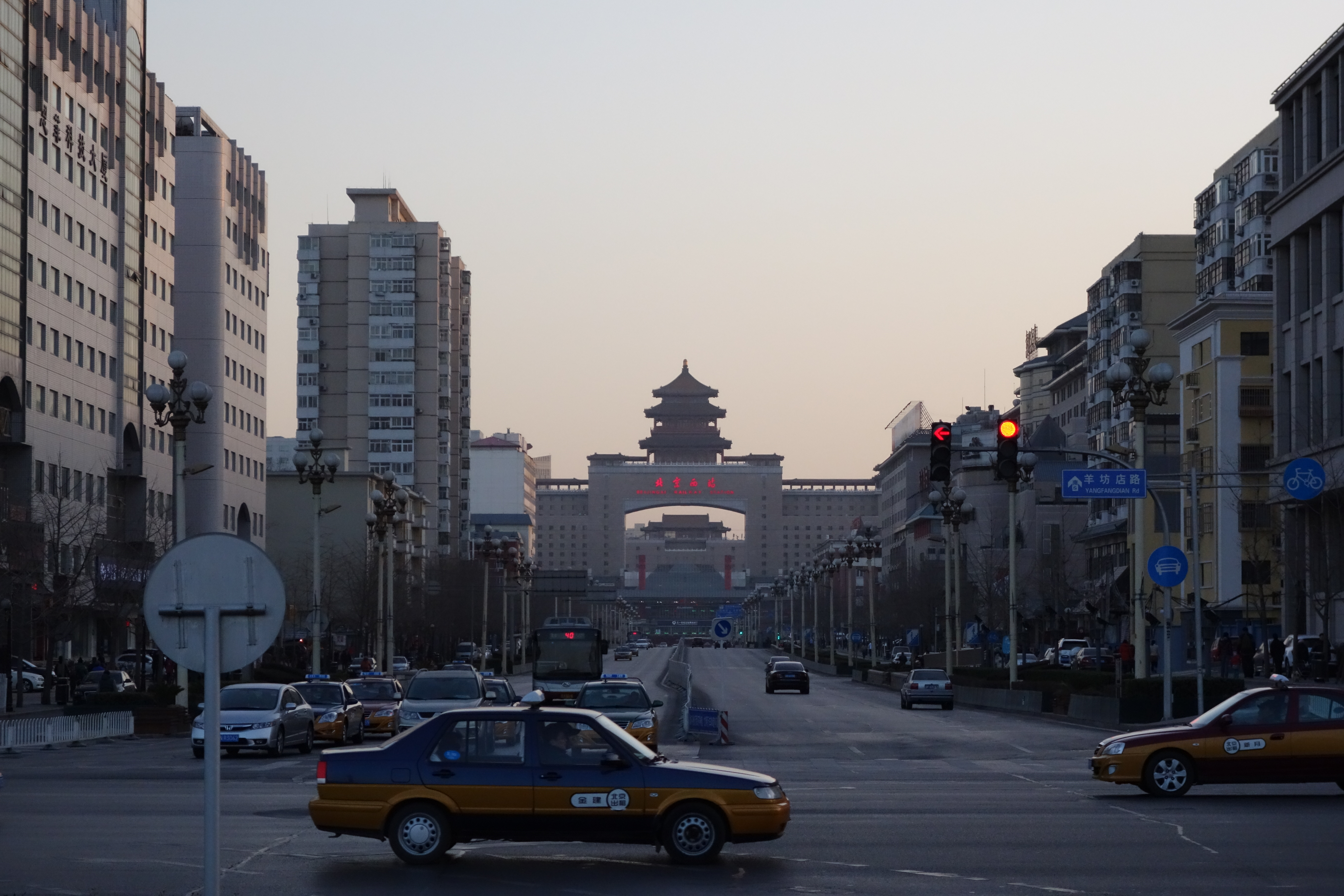 2014年1月1日的北京西站